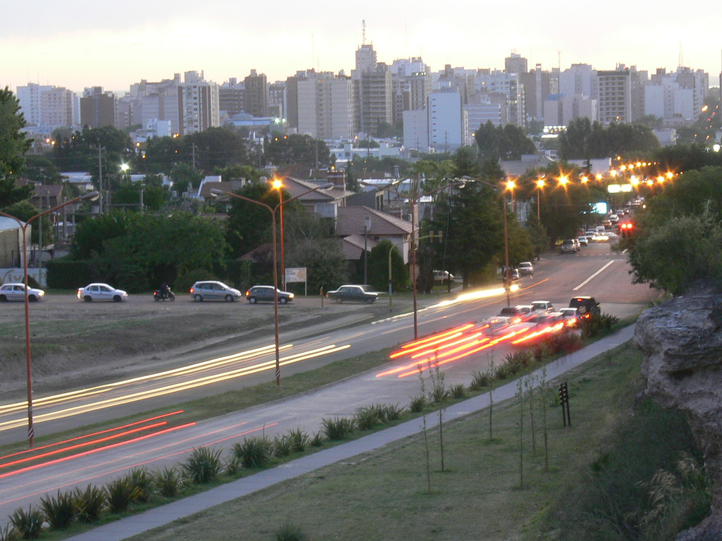 View of Bahía Blanca, Buenos Aires Province, Argentina.